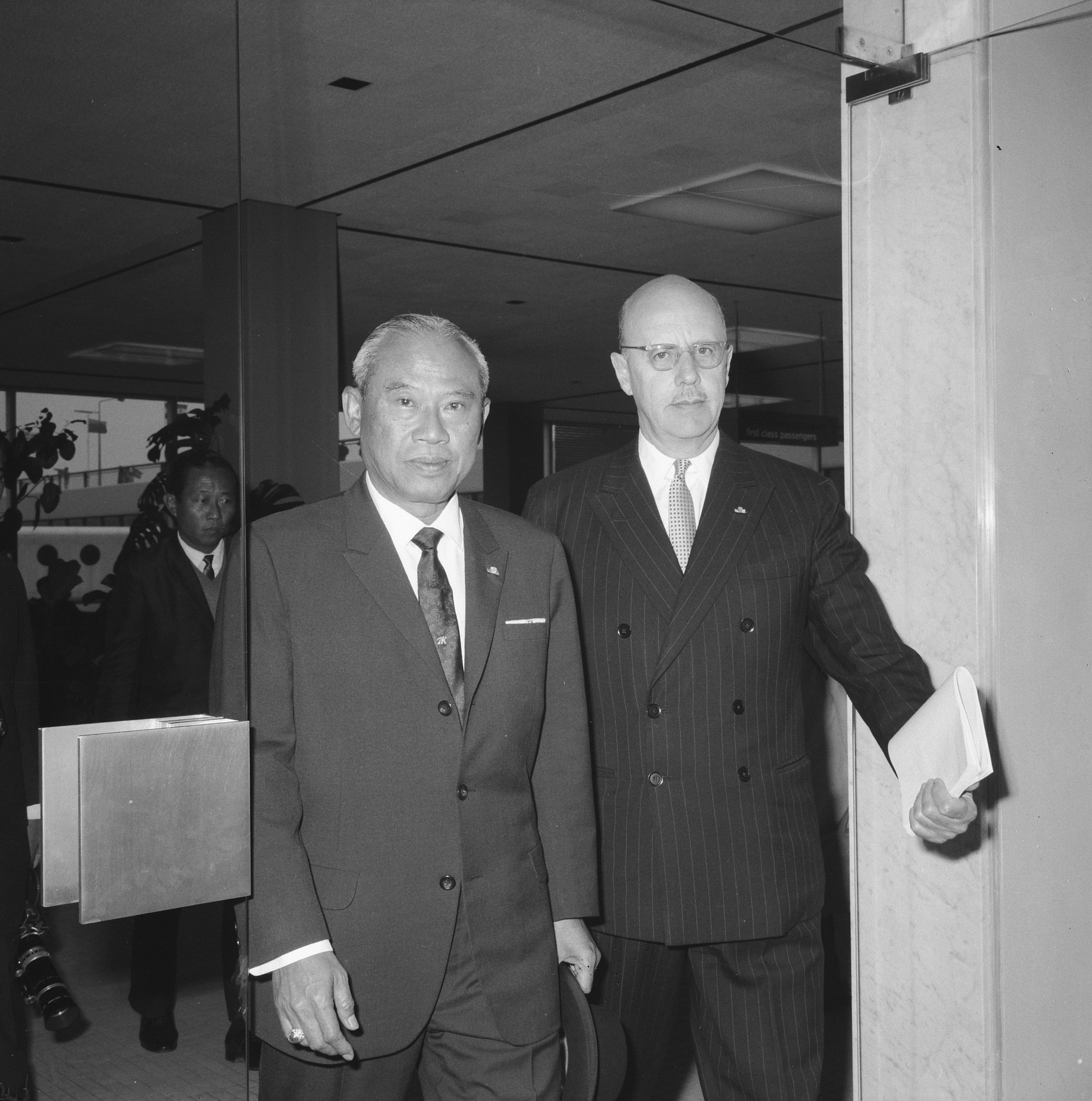 Collectie / Archief : Fotocollectie Anefo Reportage / Serie : [ onbekend ] Beschrijving : Aankomst minister president van Thailand Z. E. veldmaarschalk Thanom Kittikachorn op Schiphol (links), rechts baron Gevers die hem verwelkomde Datum : 25 april 1968 Locatie : Noord-Holland, Schiphol Trefwoorden : aankomsten Persoonsnaam : baron Gevers Fotograaf : Evers, Joost / Anefo Auteursrechthebbende : Nationaal Archief Materiaalsoort : Negatief (zwart/wit) Nummer archiefinventaris : bekijk toegang 2.24.01.03 Bestanddeelnummer : 921-2856